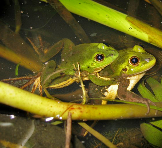 Pseudis paradoxa São Paulo (Brazil)